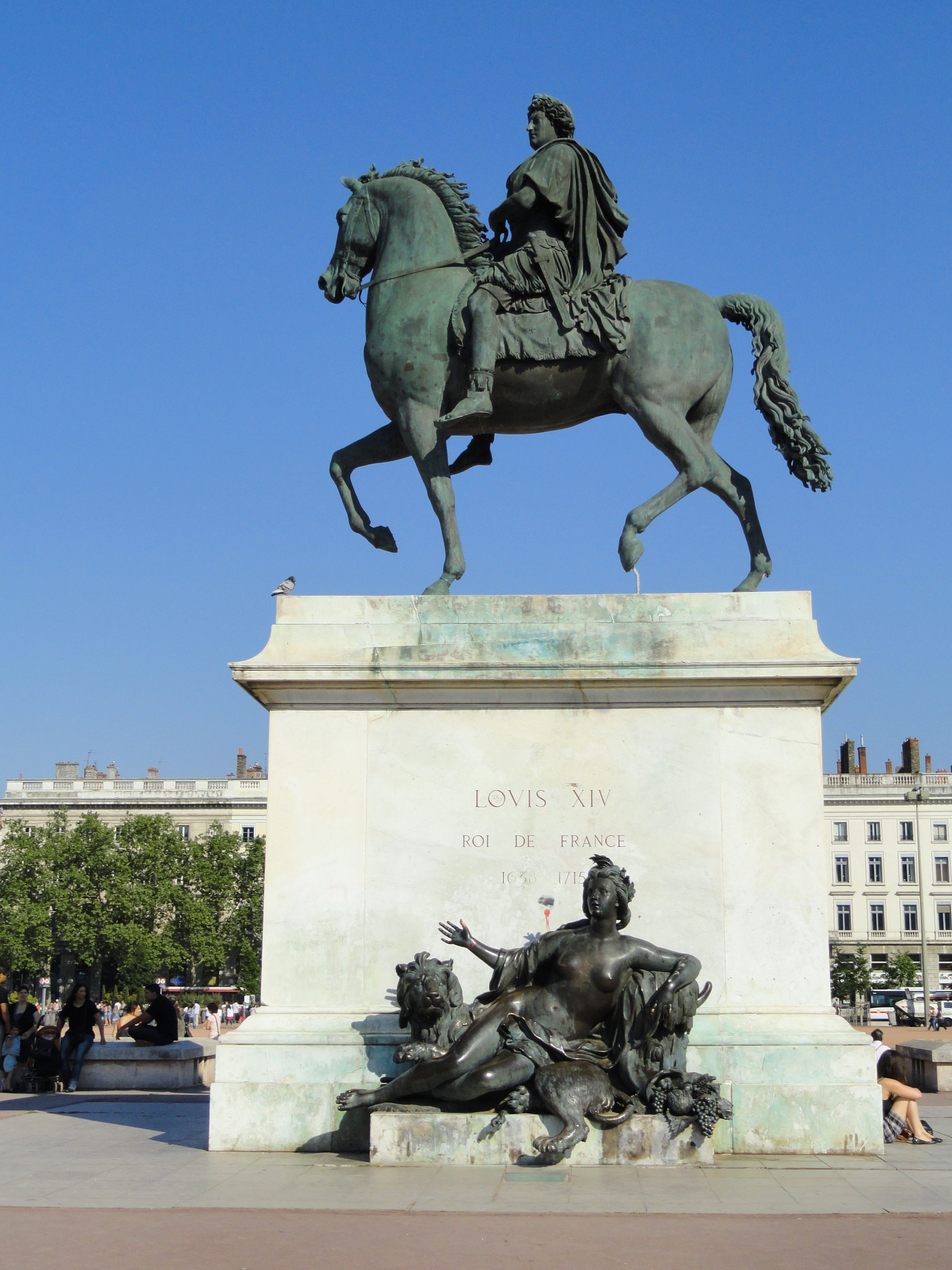 Statue of Louis XIV, Place Bellecour, Lyon, France.